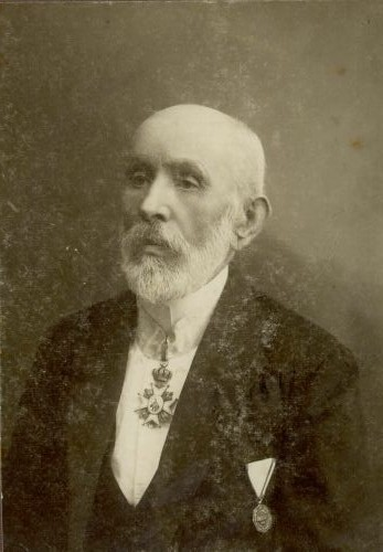 Davorin Jenko